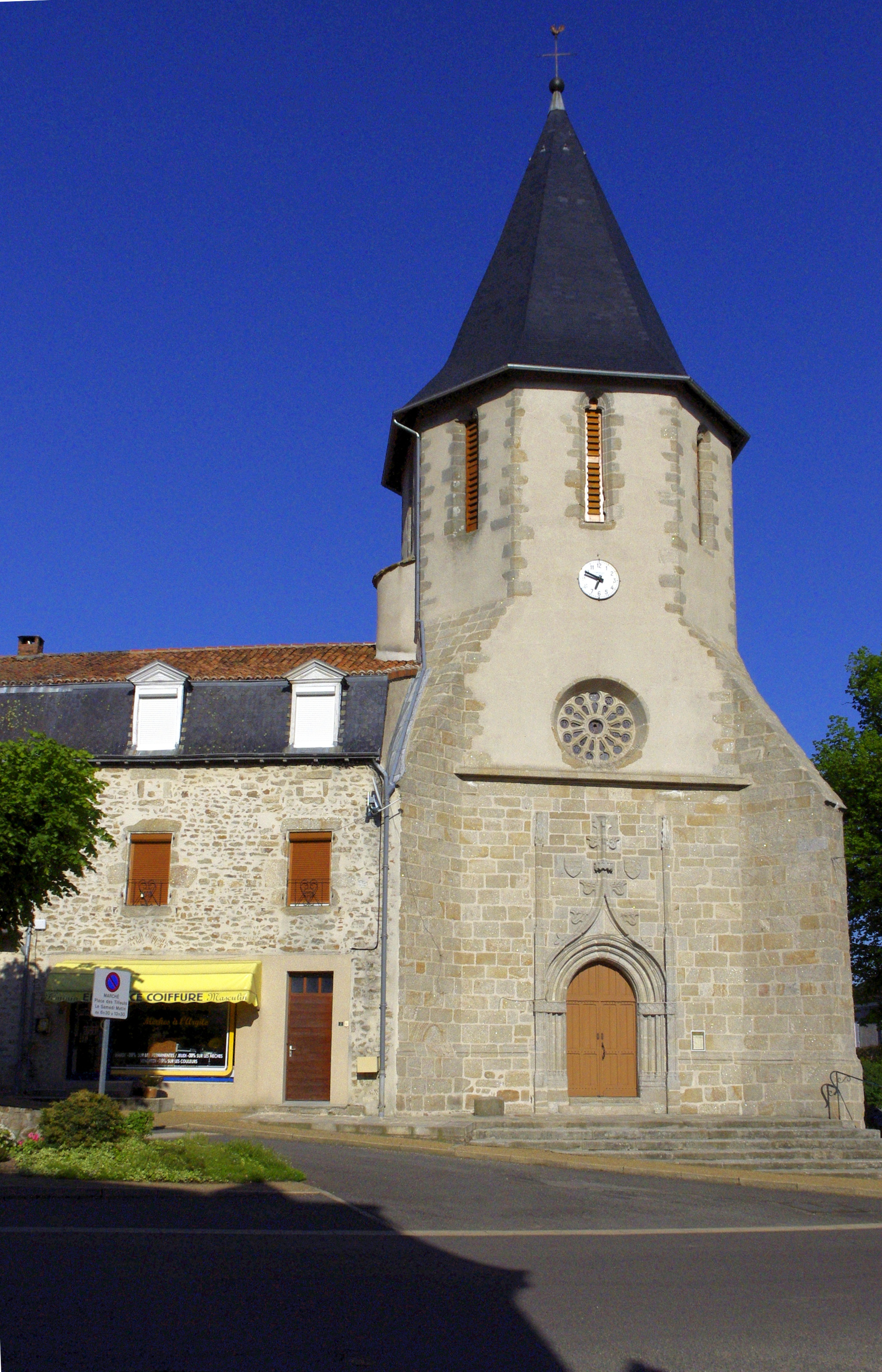 Saint Mathieu en Haute-Vienne l'église